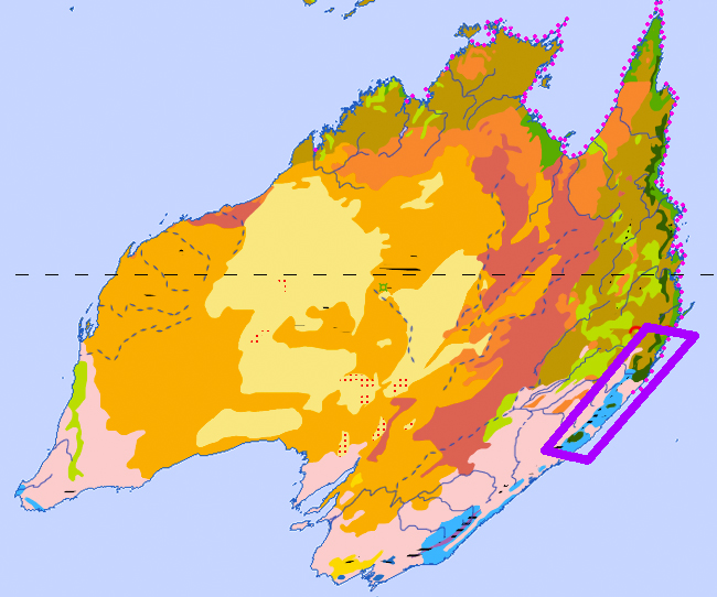 Ungefähre Lage der räumlich nicht zusammenhängenden UNESCO-Welterbegebiete der Gondwana-Regenwälder Australiens